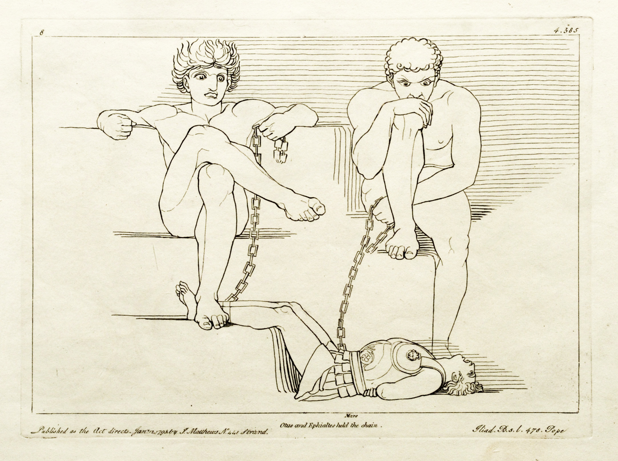 Kupferstich (1795) von Tommaso Piroli (1752 – 1824) nach einer Zeichnung (1793) von John Flaxman (1755 – 1826).